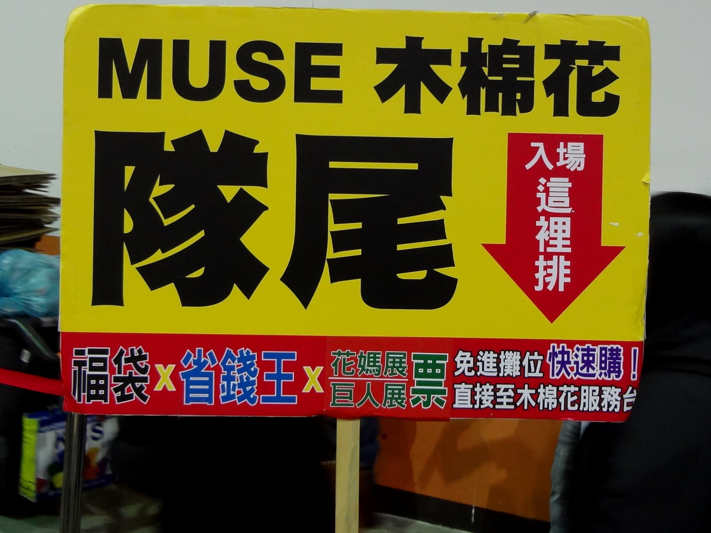 2016年第四屆台北國際動漫節，木棉花國際攤位排隊參觀者最尾端標示牌。